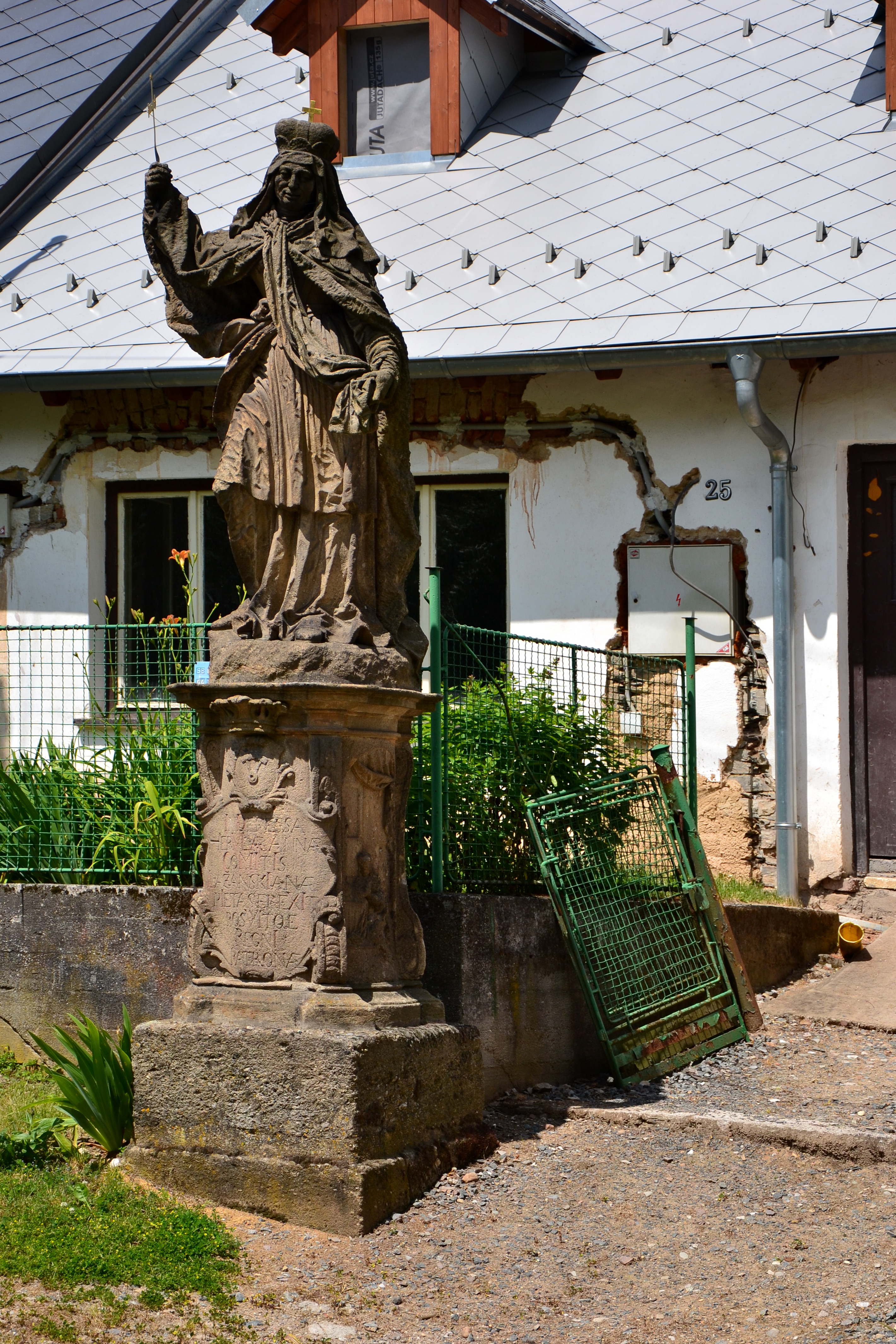 Sochy - soubor soch (Manětín), Vysoká cesta, od města ke hřbitovu, Manětín